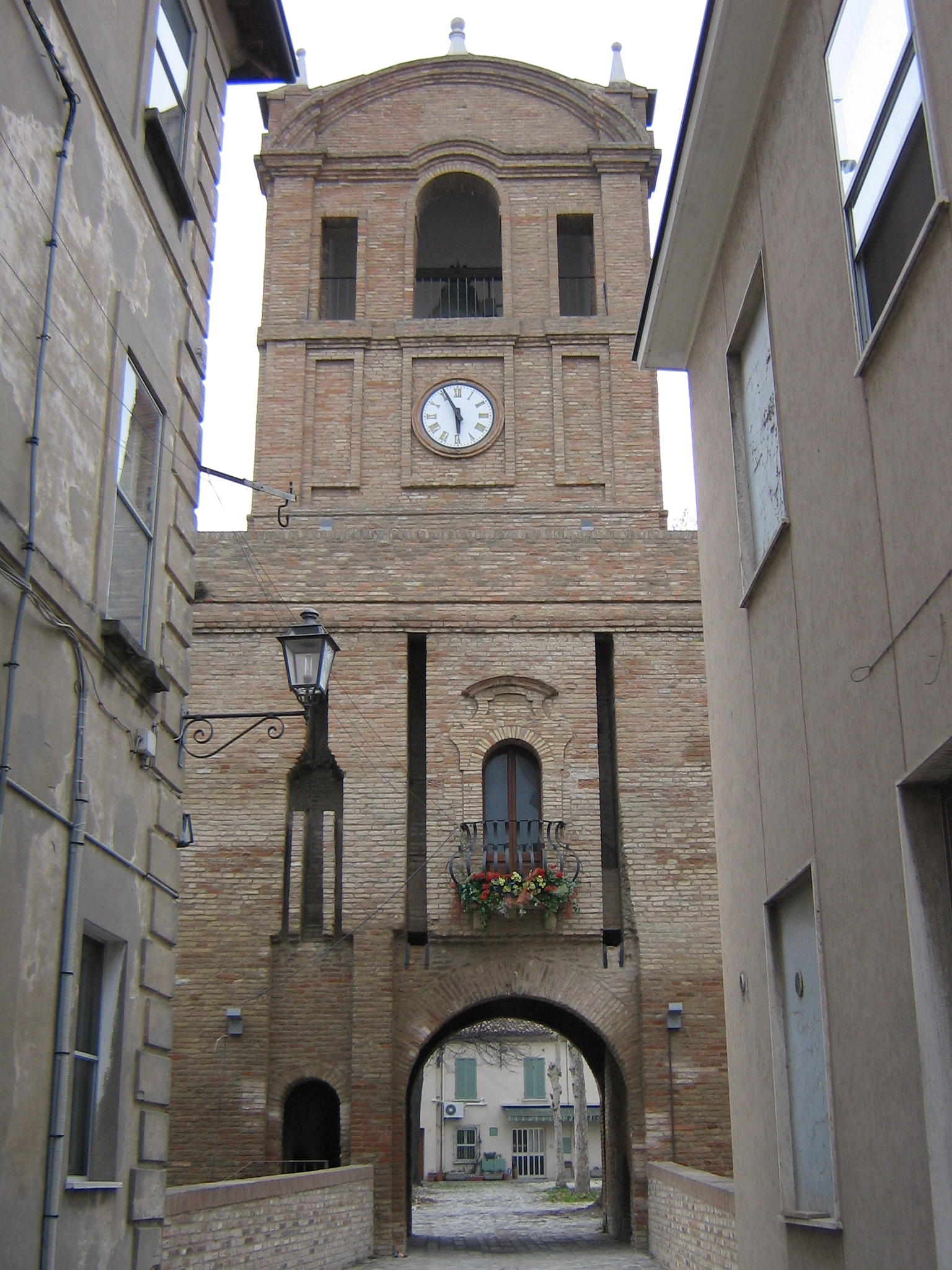 Castello malatestiano, Gatteo (FC), Italy